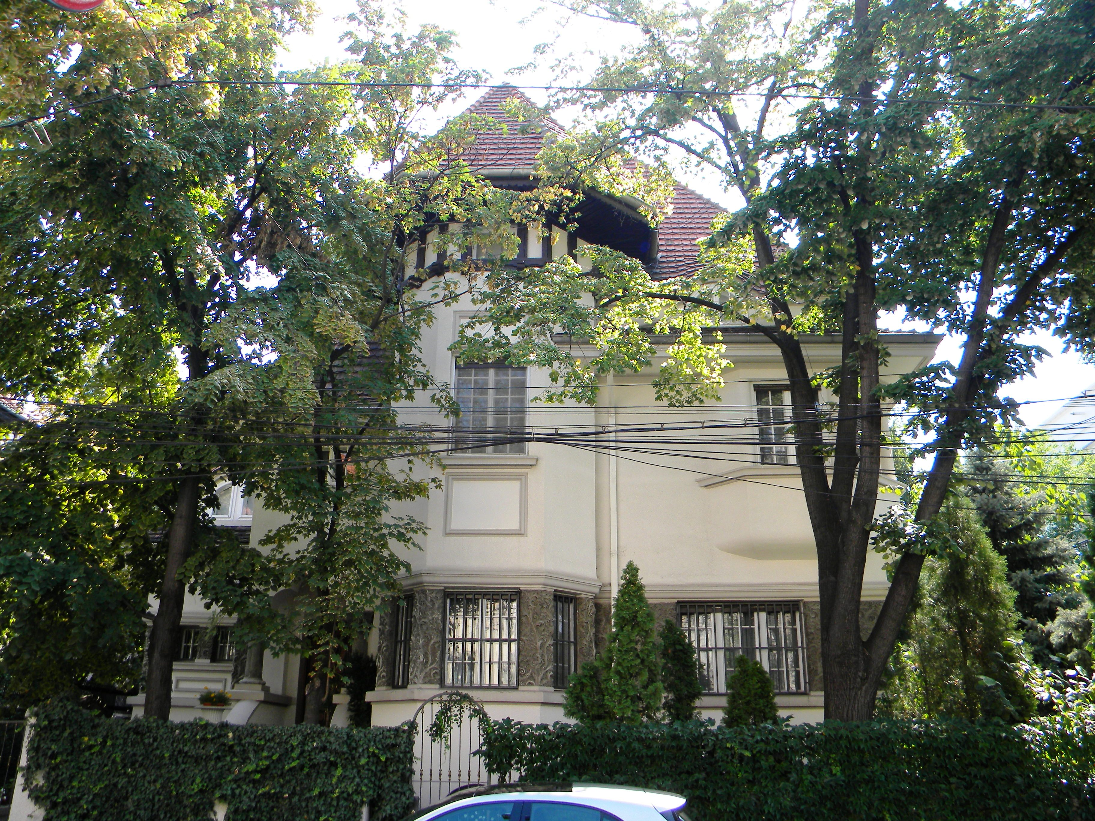 Casa pe Str. Dumbrava Rosie nr. 8, Bucuresti sect. 2; (1)